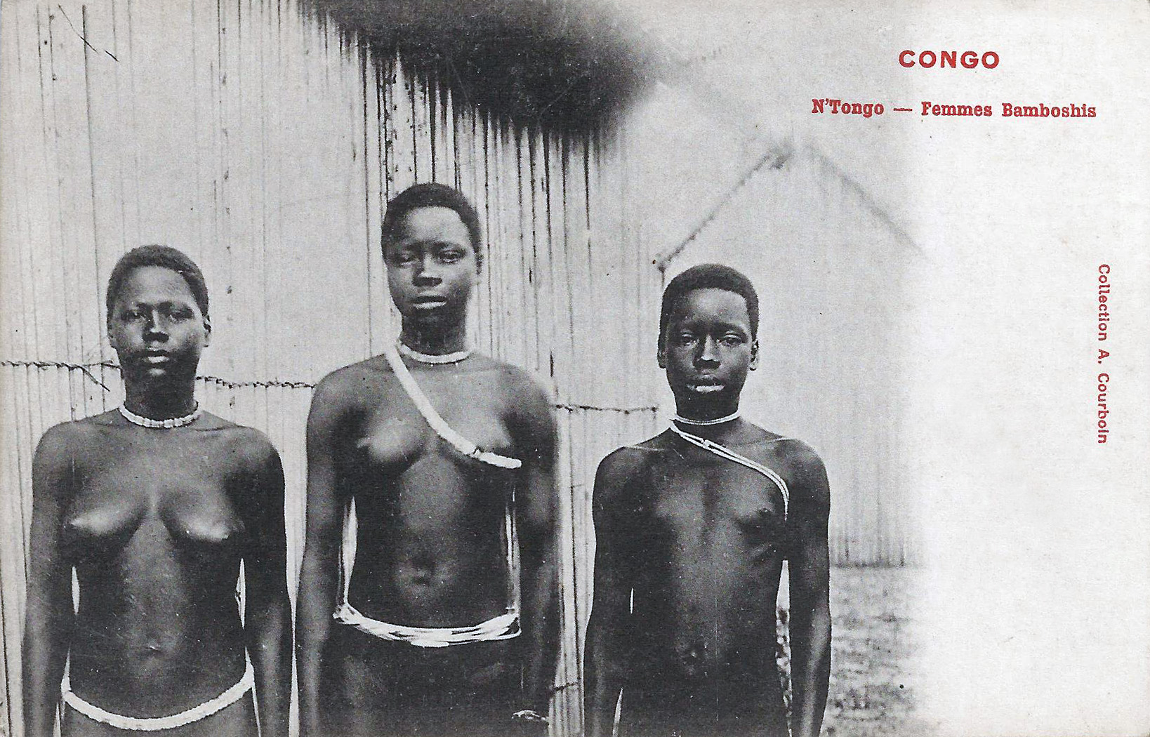 N'Tongo. Femmes Bamboshis. Collection A. Courboin Congo